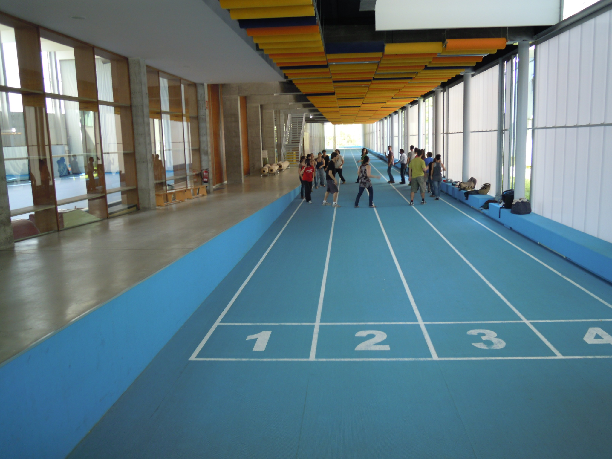 Pista de atletismo na Facultade de Ciencias da Educación e do Deporte de Pontevedra.